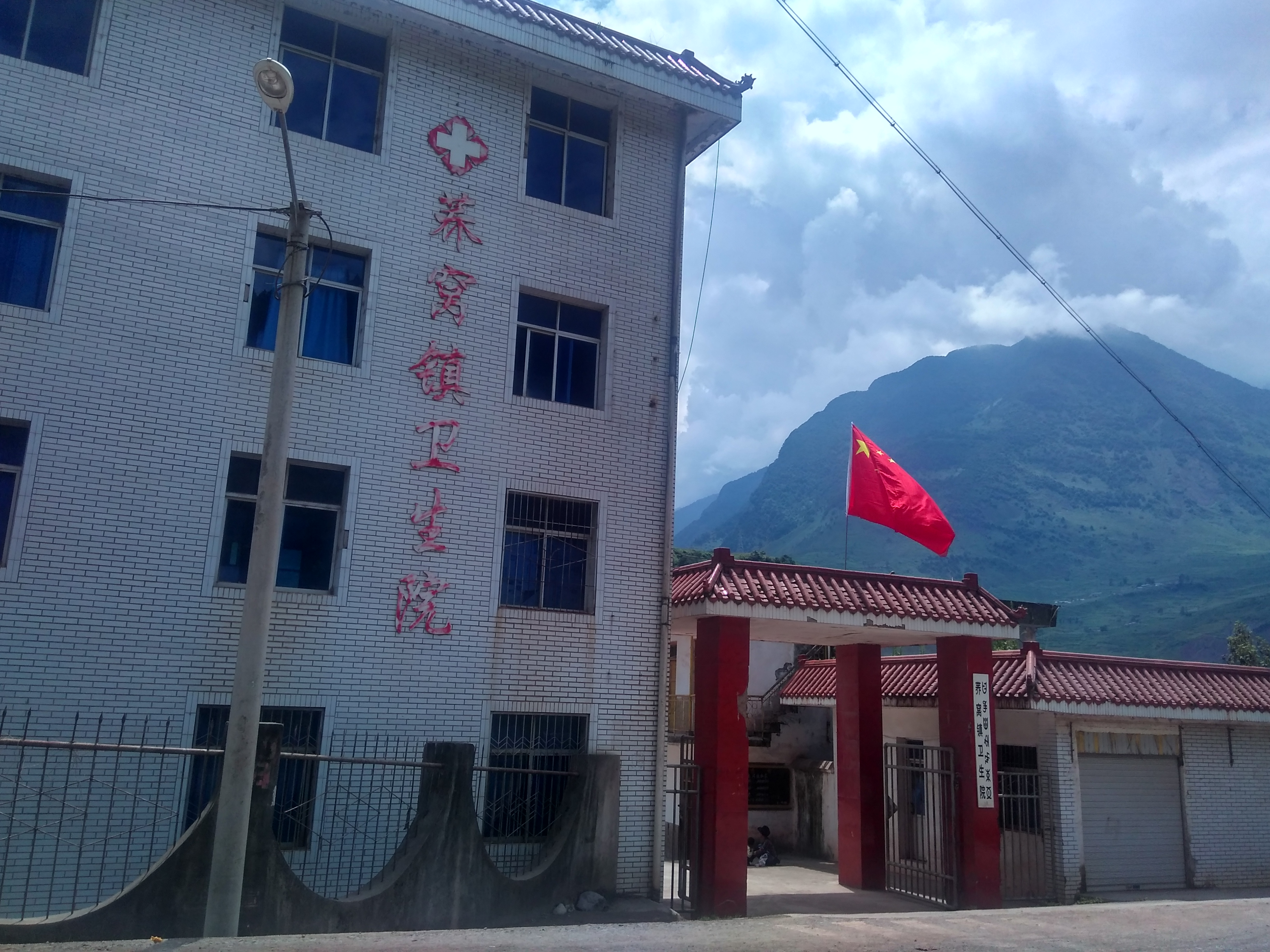 荞窝镇机构